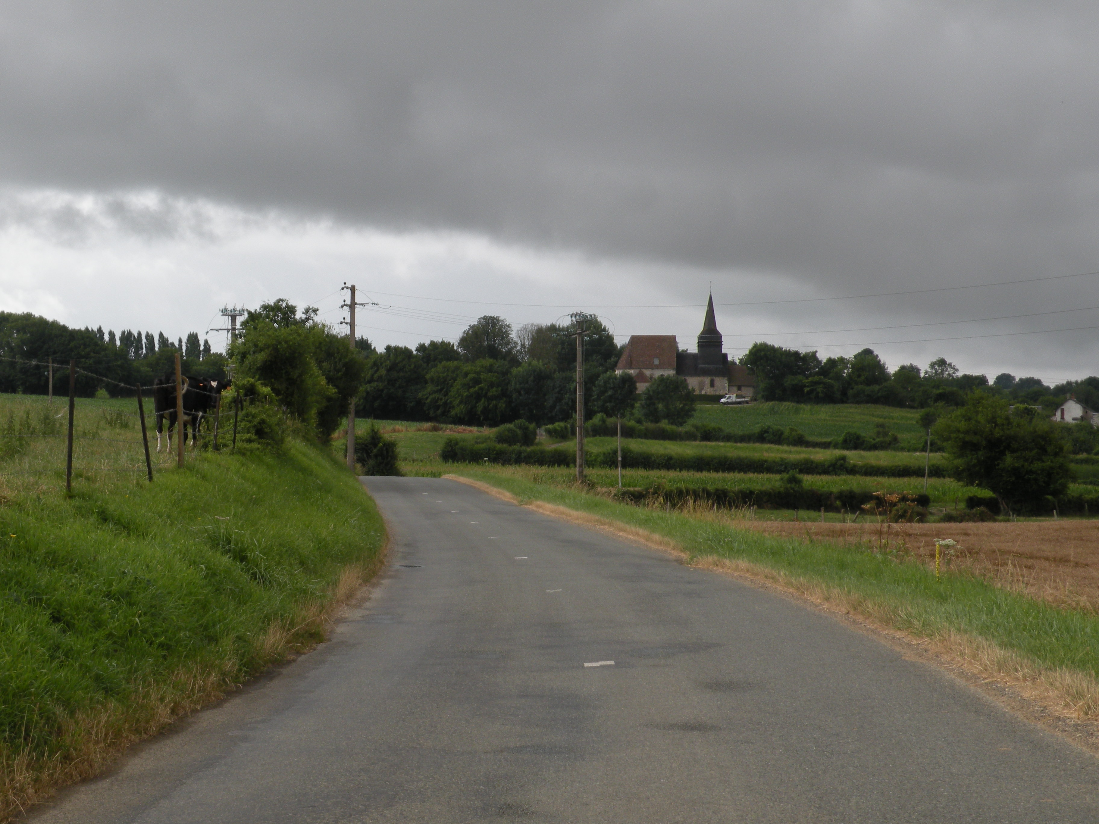 Hanvoile